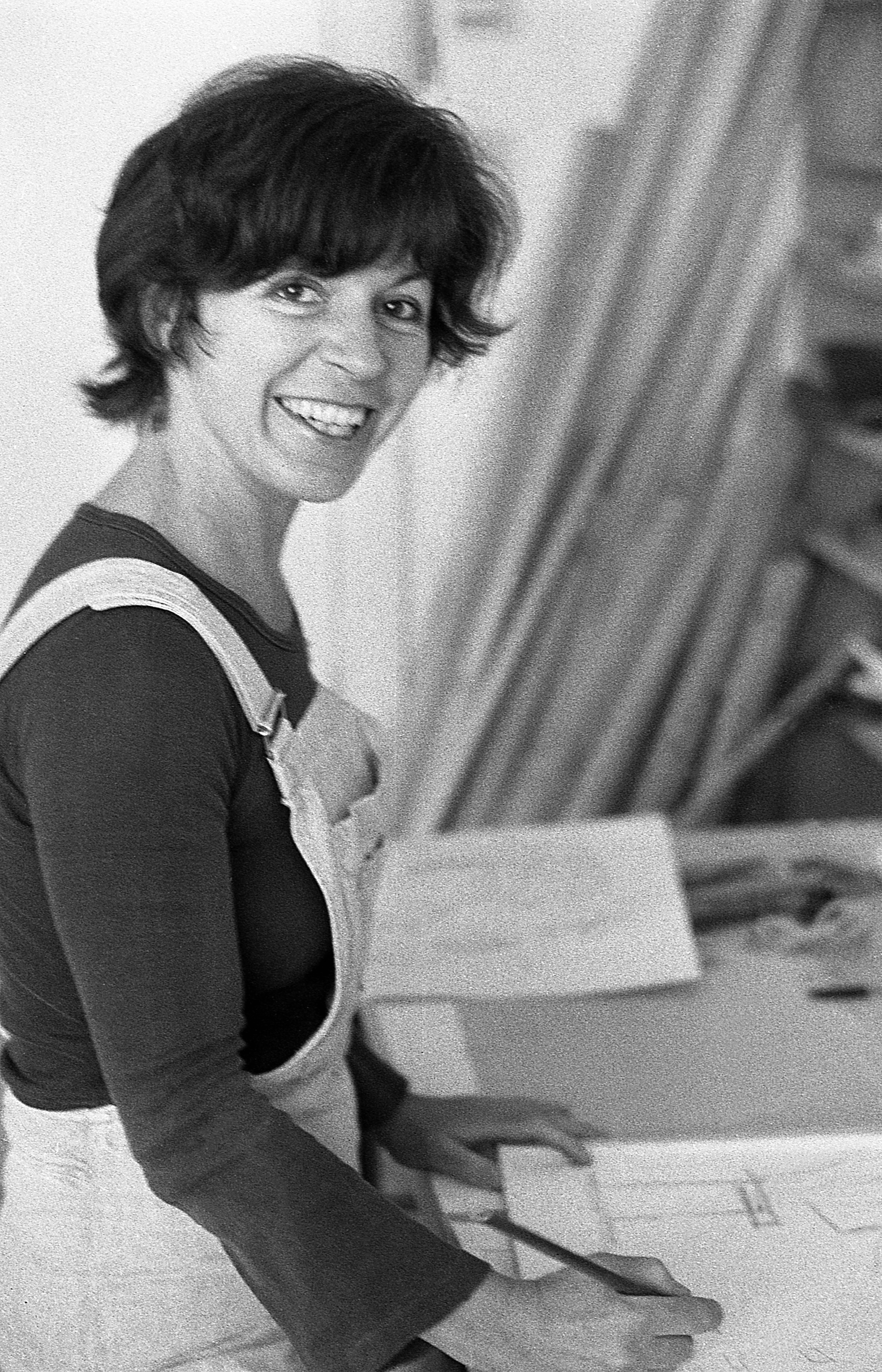 Bildhauerin, Künstlerin